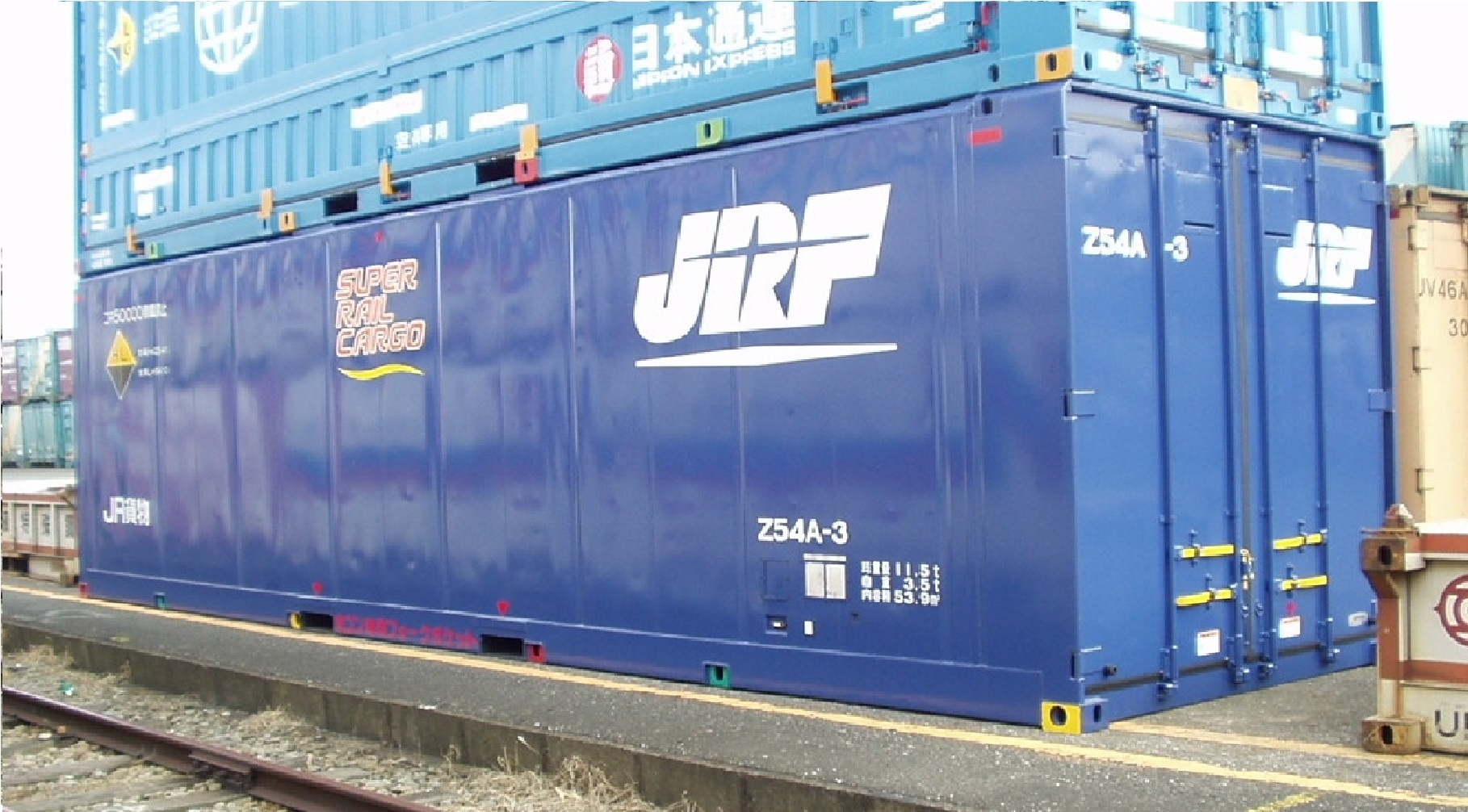 撮影地＝東京(タ)